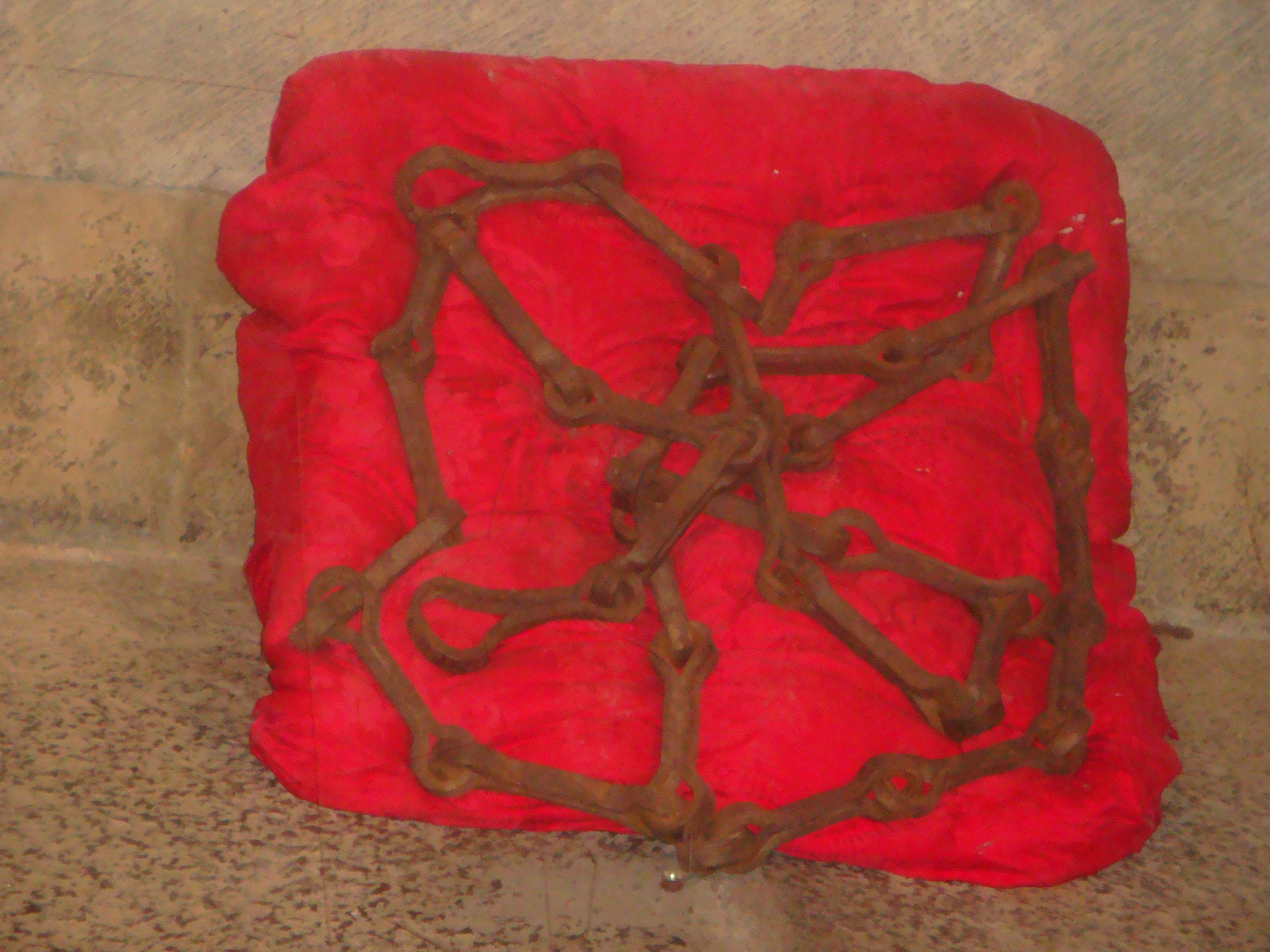 Cadenas en las cuales se inspiraron para configurar el escudo de Navarra, ubicadas en el Museo de Roncesvalles